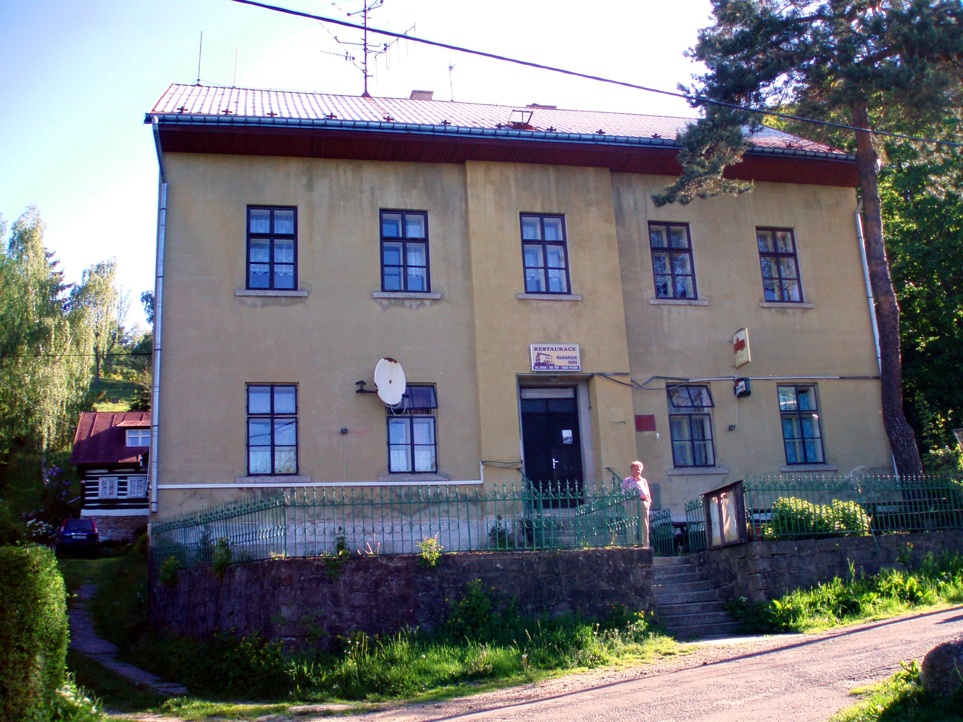 Restaurant und Hotel Mariánská hora